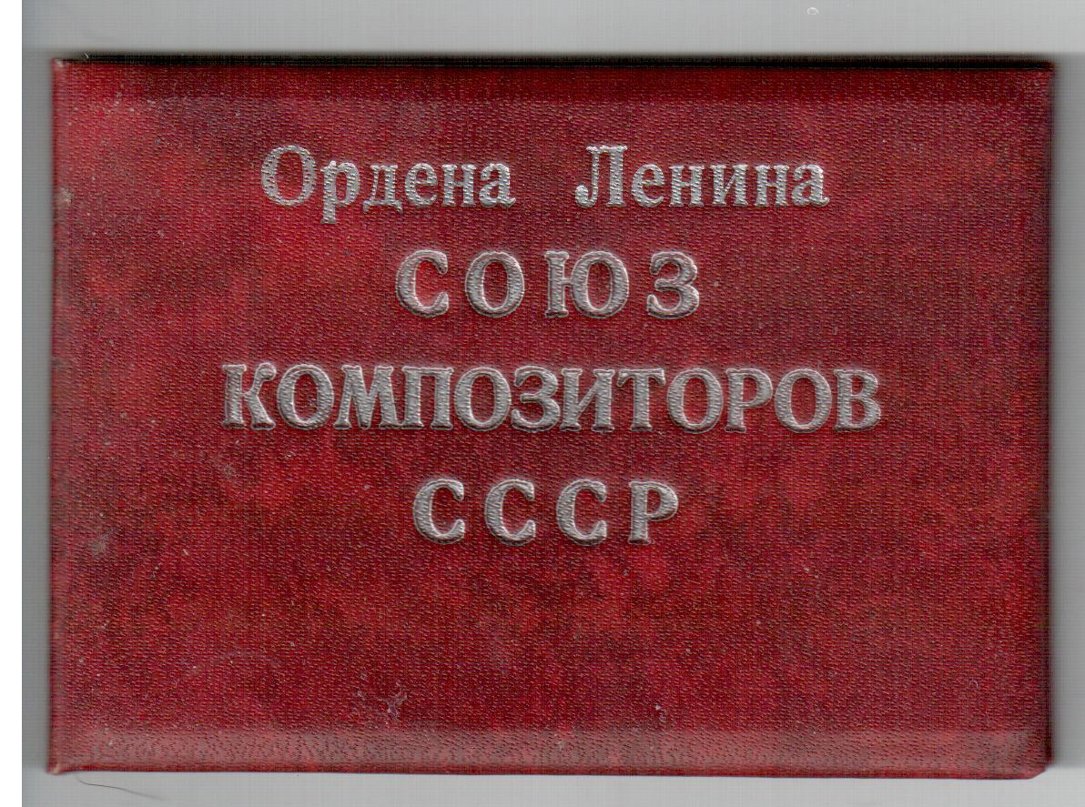 Обложка членского билета Союза композиторов СССР (1990)